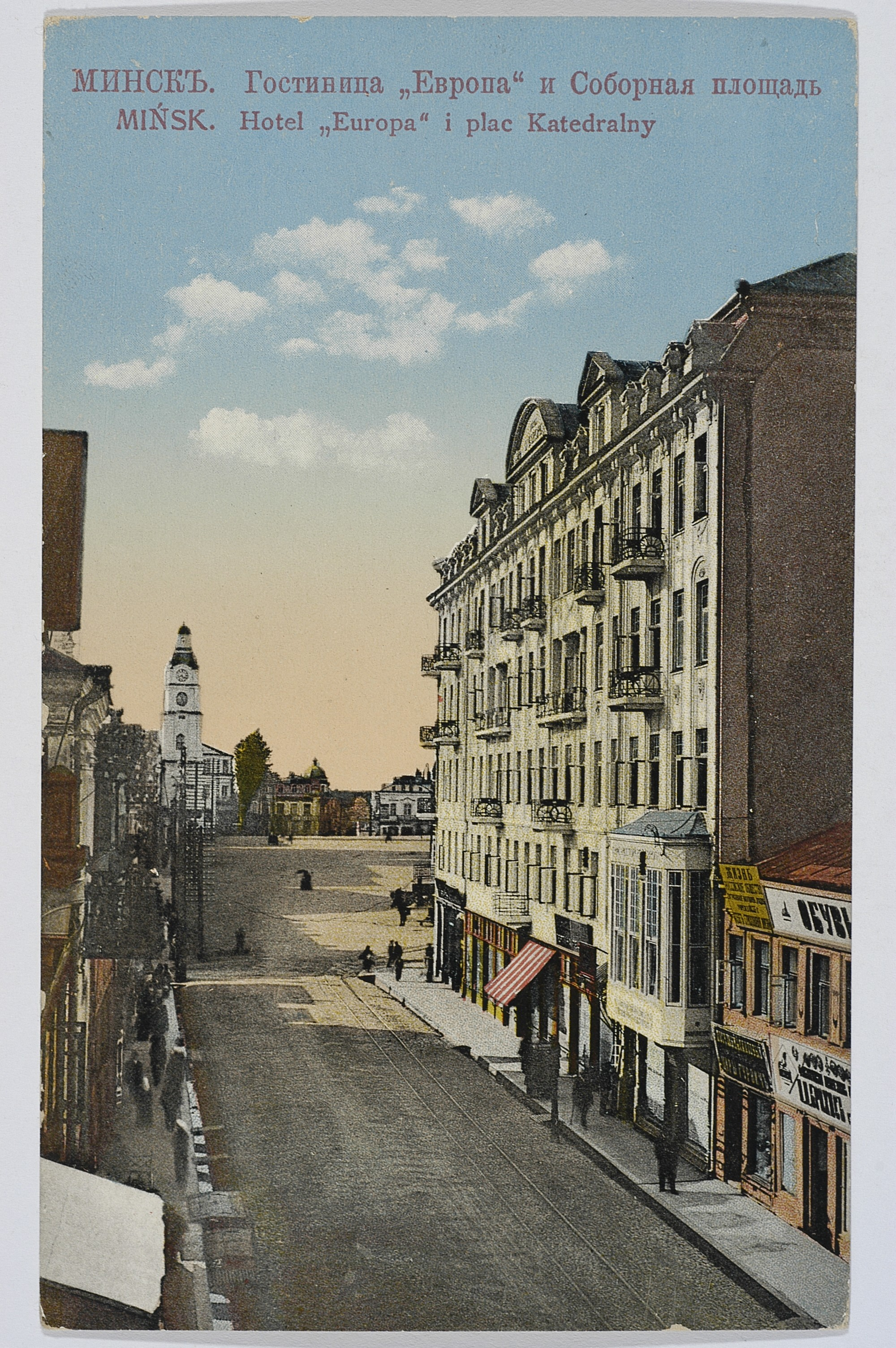 Беларуская (тарашкевіца): Менск (Miensk), вуліца Францішканская (vulica Franciškanskaja) у бок пляцу Высокага Рынку (plac Vysoki Rynak). Гатэль Эўропа